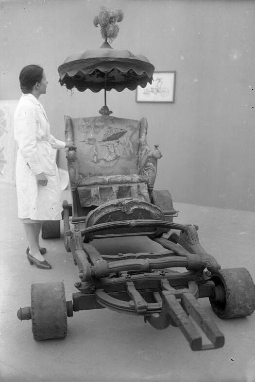 Luxus vor 150 Jahren! Der Prunkwagen der Schwester des Alten Fritz, in welchem sie durch den Park von Sanssoucci gefahren wurde.